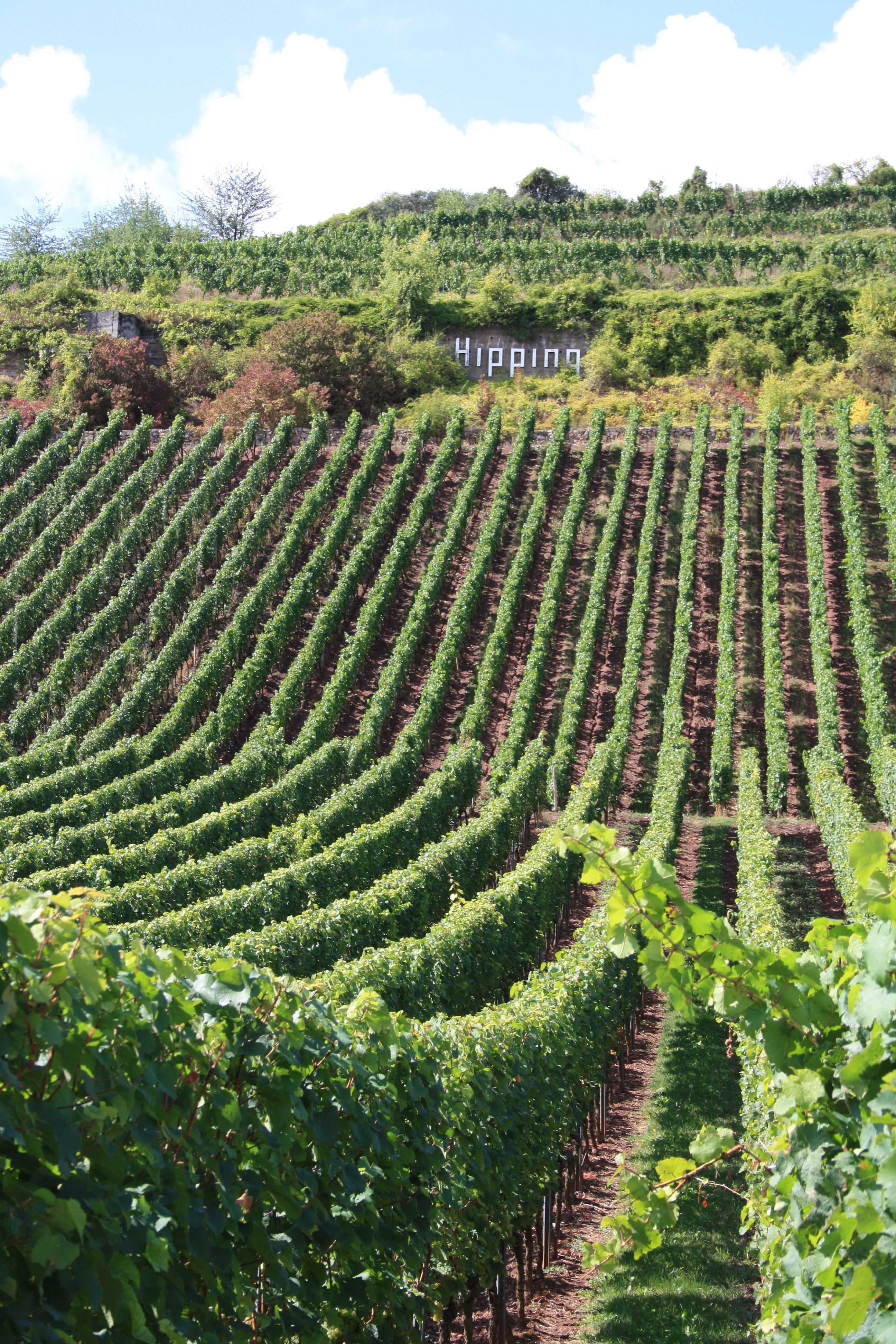 Weinberge Nierstein Hipping